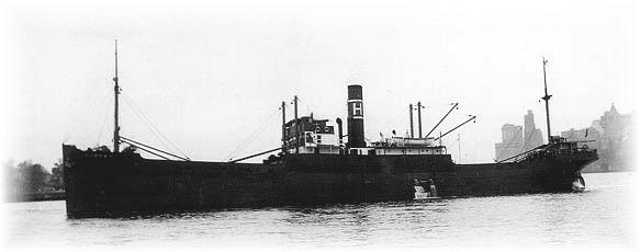 Der norwegische Frachter Karmøy